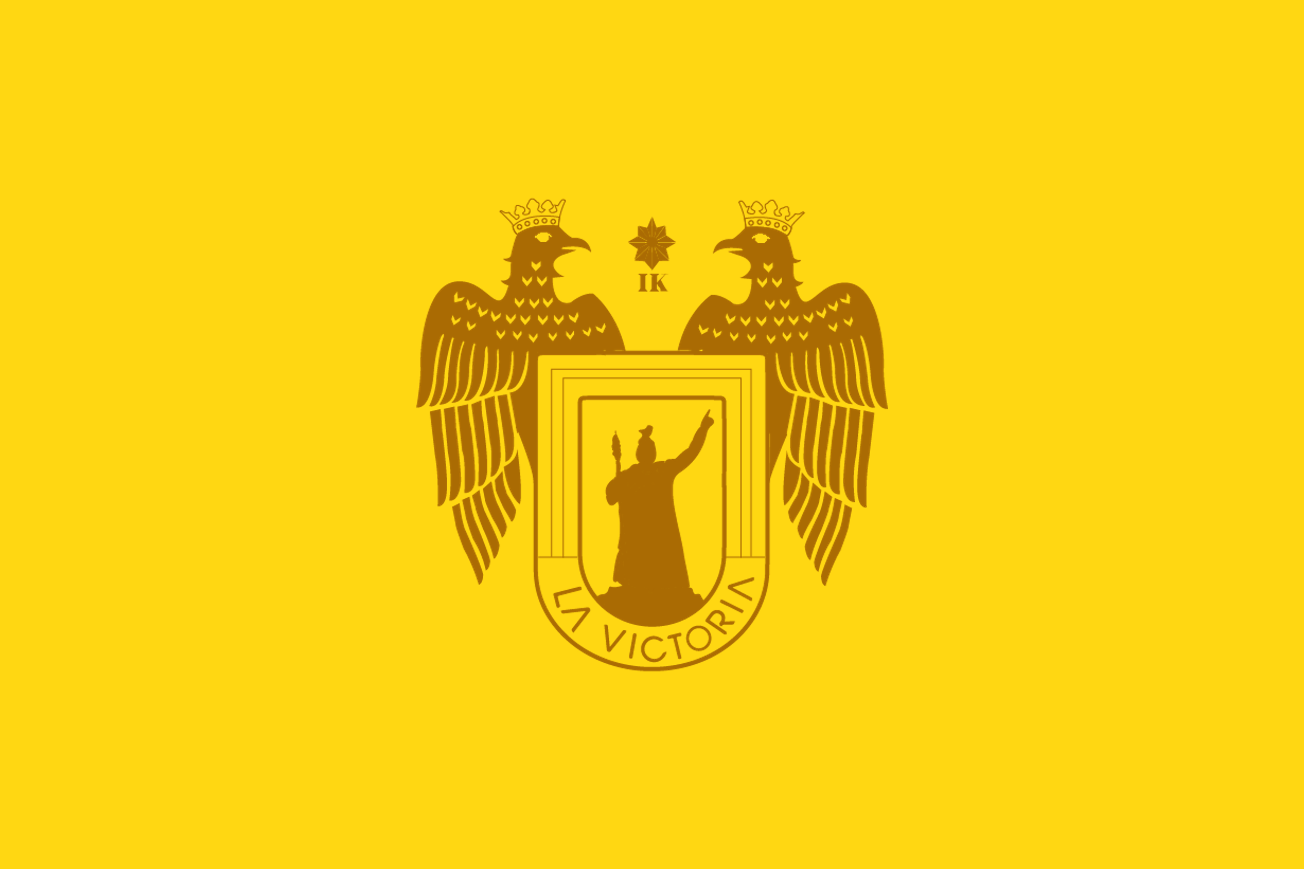 Bandera del distrito La Victoria en Lima